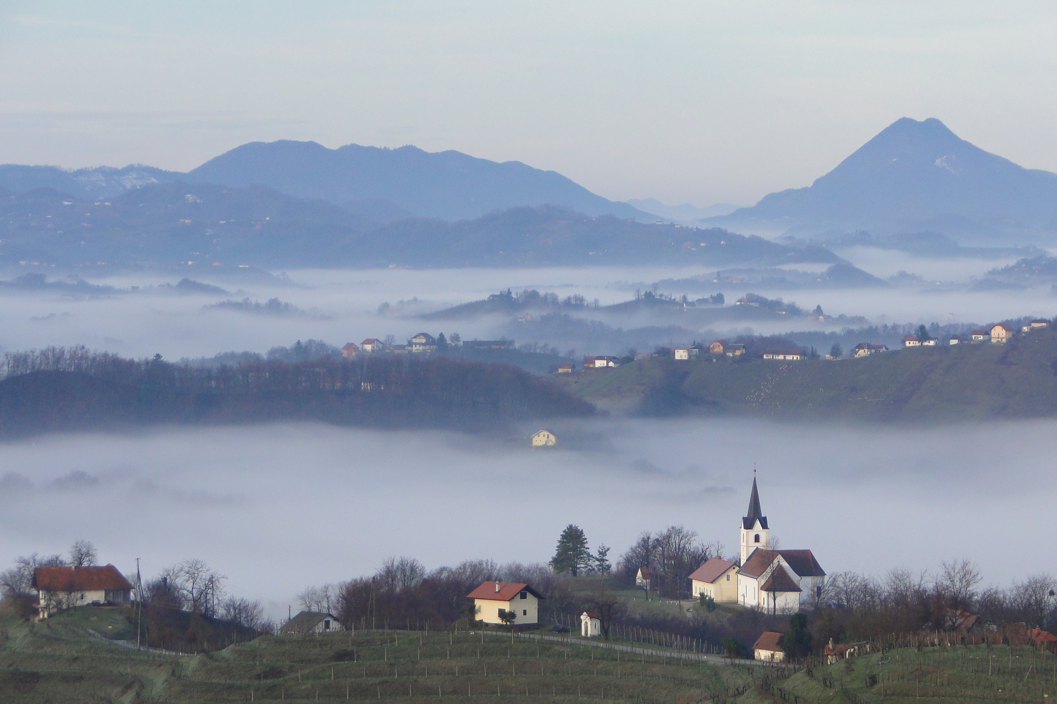 Pogled proti cerkvici Sv. Ana